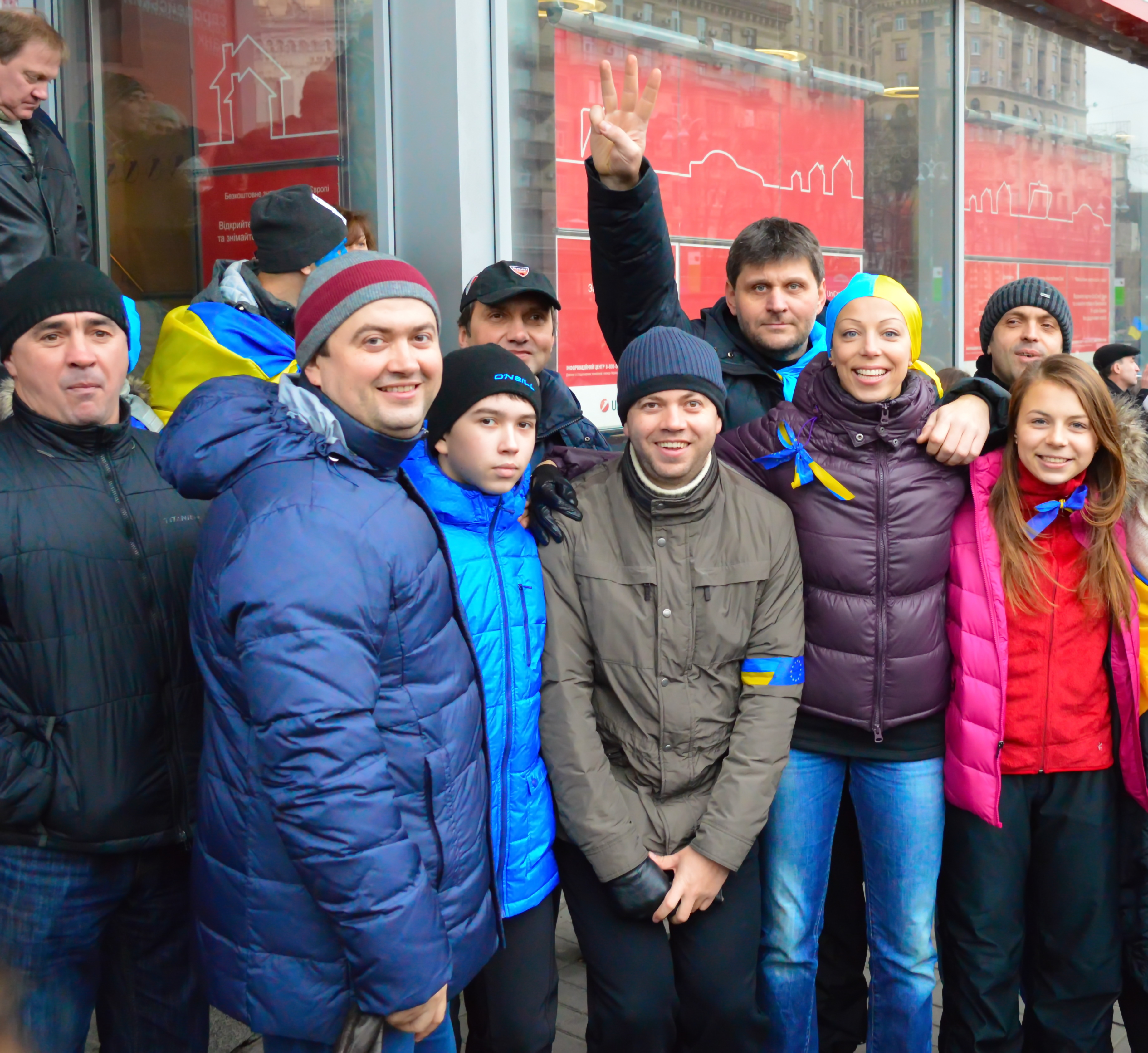 Фото зроблене на Майдані на початку Революції Гідності. 02.10. 2013 рік